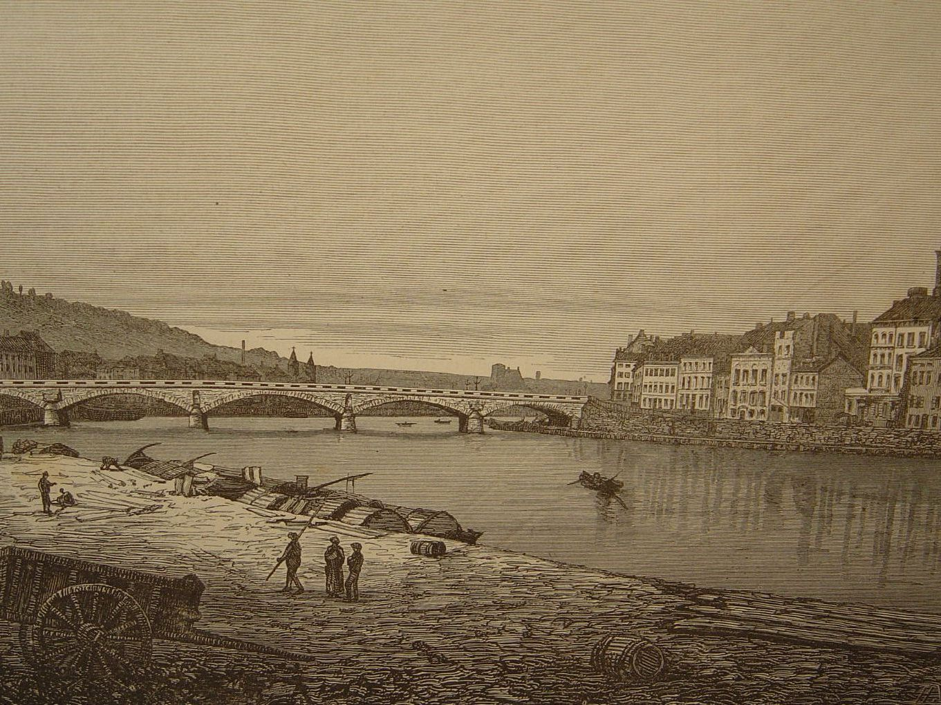 le pont des Arches à Liège